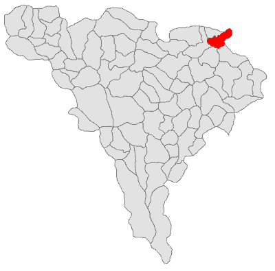 Categorie:Hărţi ale judeţului Alba